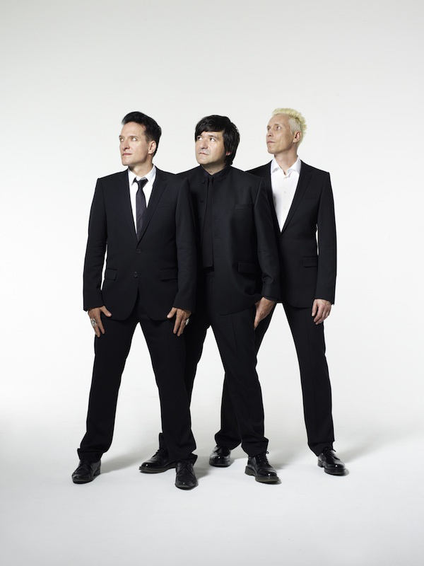 Die Band Die Ärzte. Von links nach rechts: Bela B, Rodrigo González und Farin Urlaub